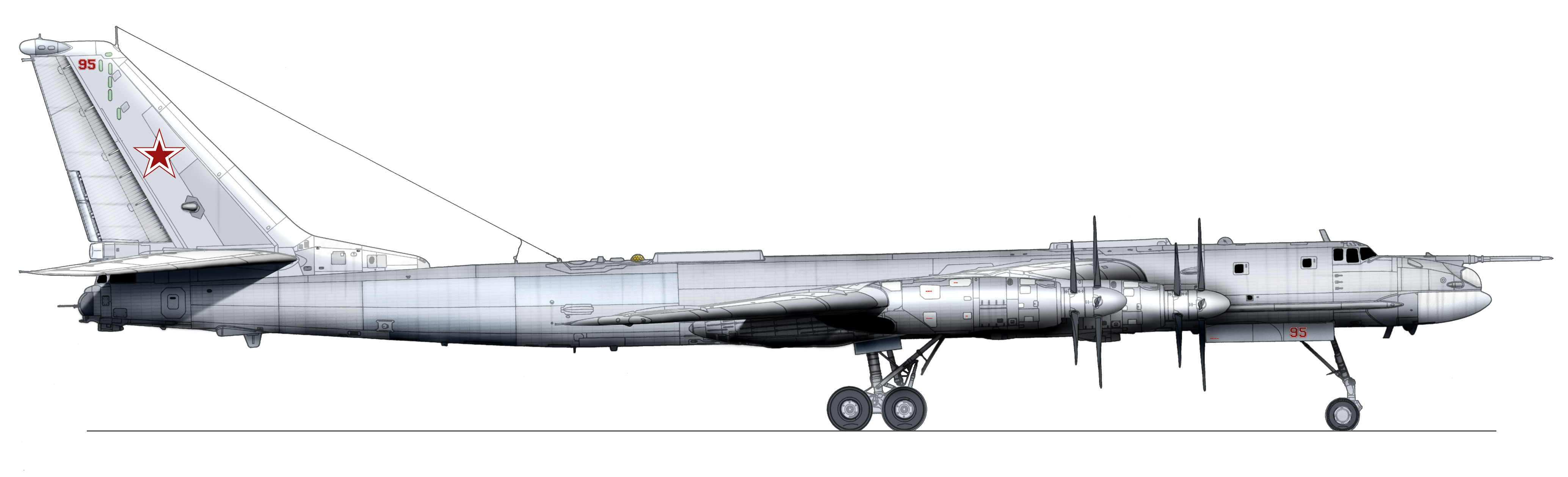 Soviet bomber Tupolev Tu-95